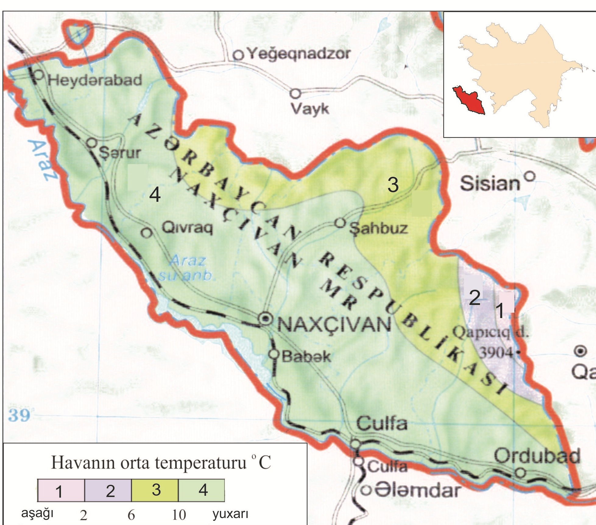 Orta Araz təbii vilayətində havanın orta illik temperaturu